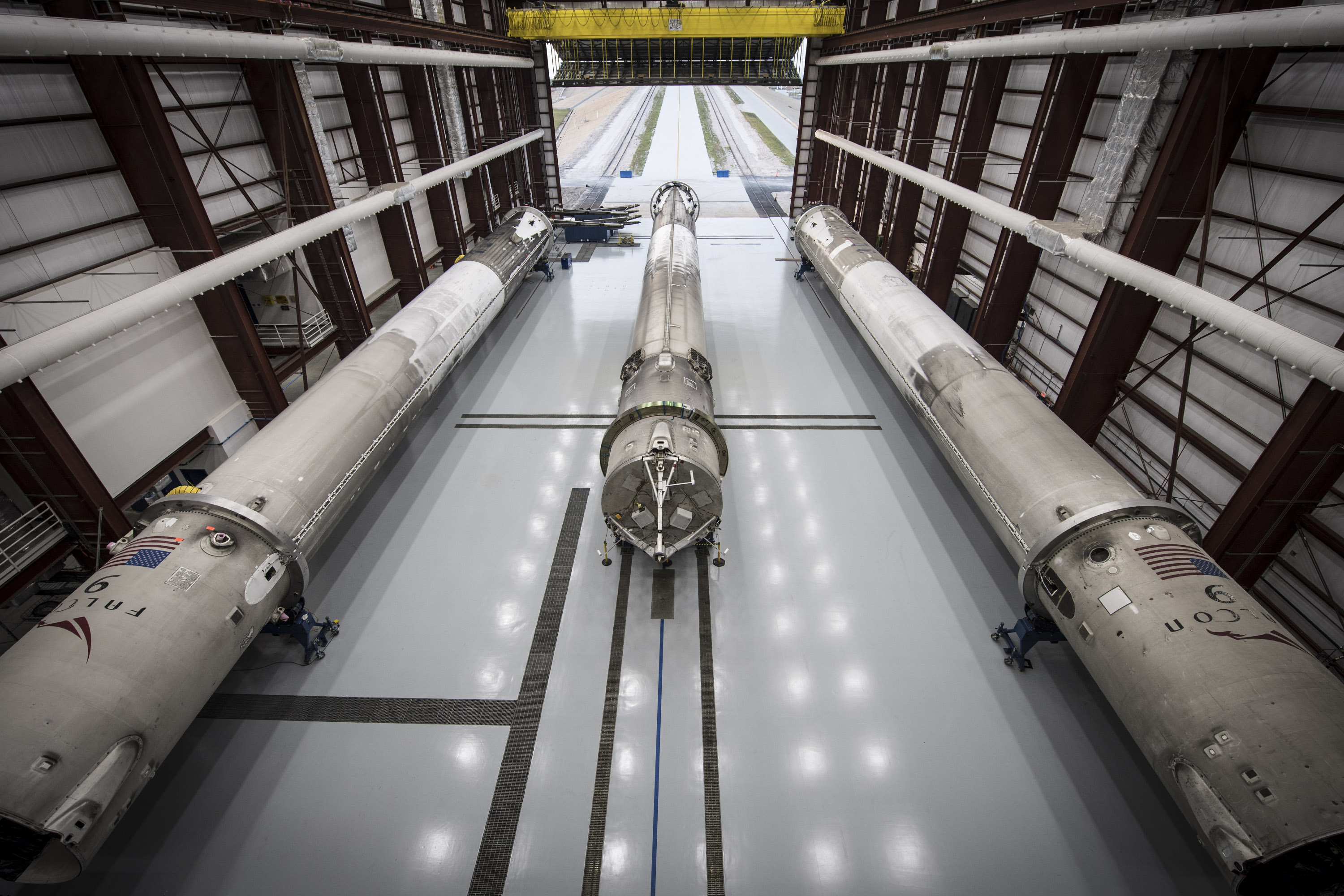 Landed rockets in hangar 39A